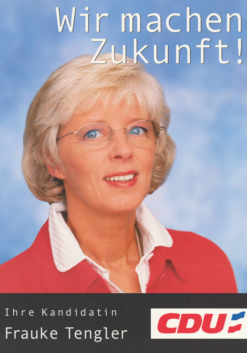 Wir machen Zukunft! Ihre Kandidatin Frauke Tengler CDUAbbildung:PorträtfotoPlakatart:Kandidaten-/Personenplakat mit PorträtObjekt-Signatur:10-012 : 1236Bestand:Landtagswahlplakate Schleswig-Holstein (10-012)GliederungBestand10-18:Landtagswahlplakate Schleswig-Holstein (10-012) » CDULizenz:KAS/ACDP 10-012 : 1236 CC-BY-SA 3.0 DE